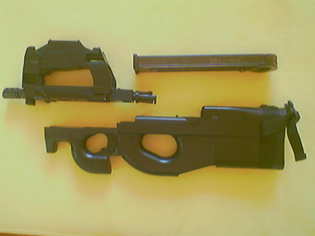 Rozebrana kopie P90 pro airsoft.